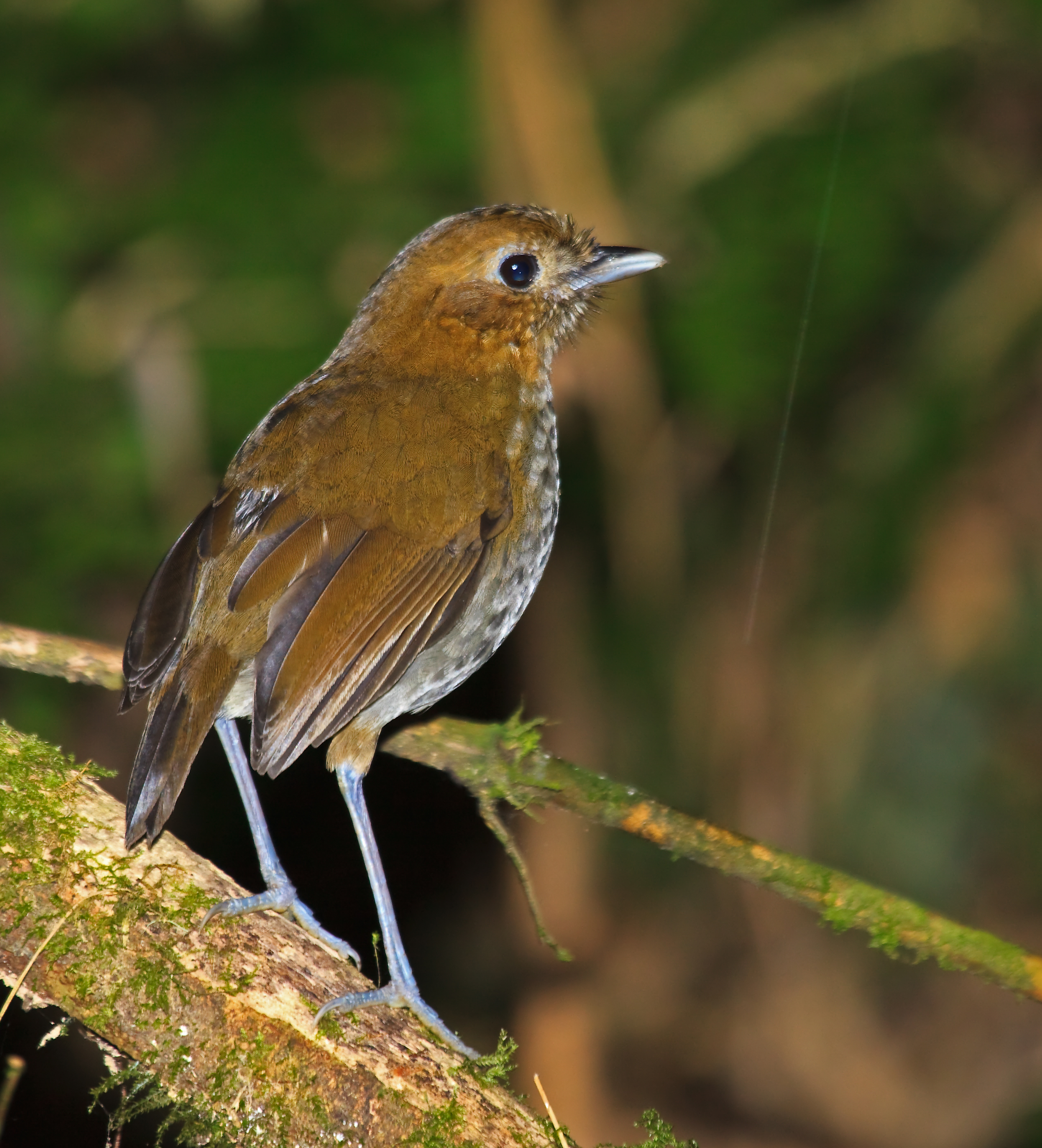 Urrao Antpitta, Colibri del Sol, Colombia